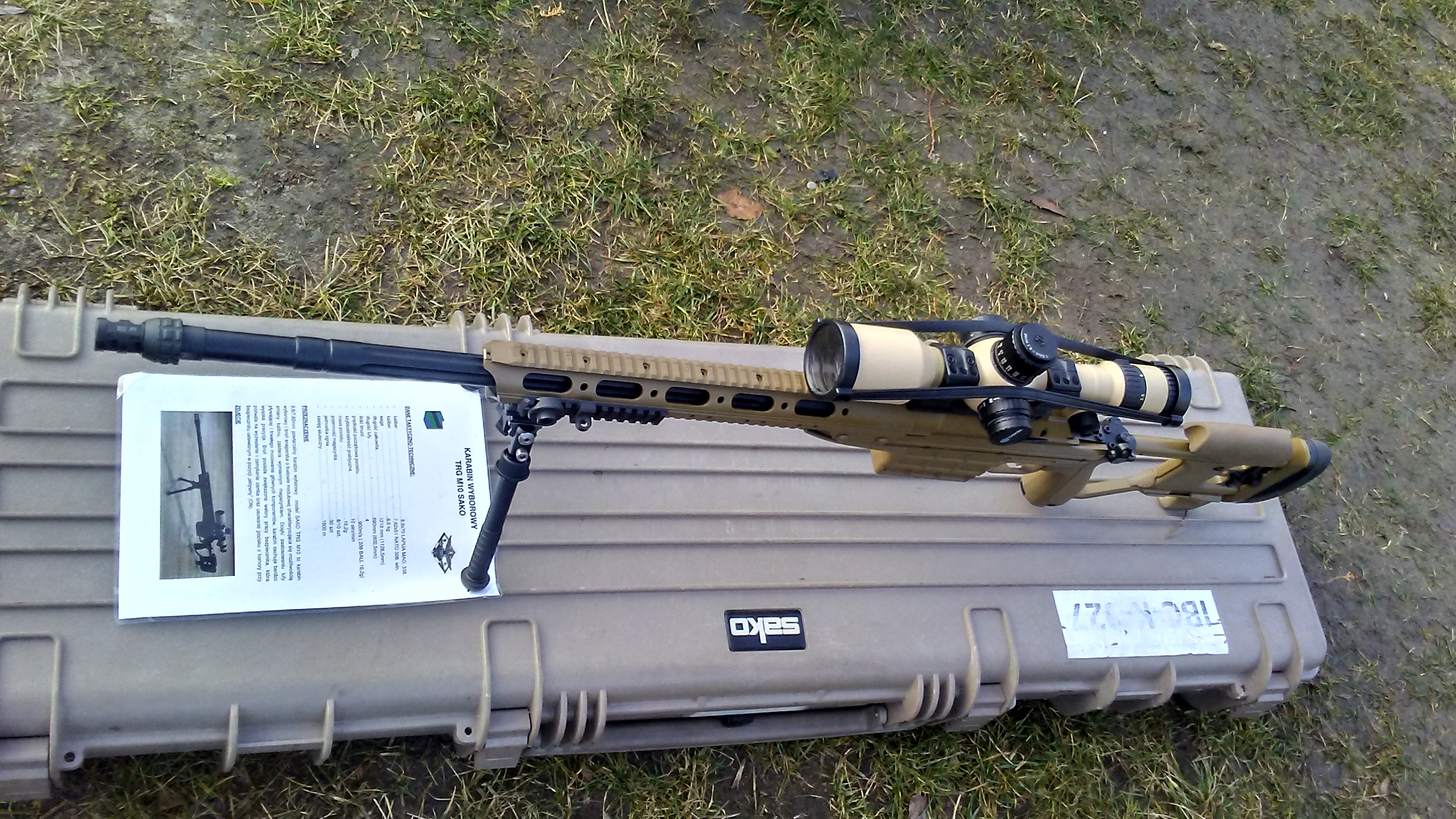 Fiński karabin wyborowy Sako TRG M10 z wyposażenia Jednostki Wojskowej 4391 w Tomaszowie Mazowieckim